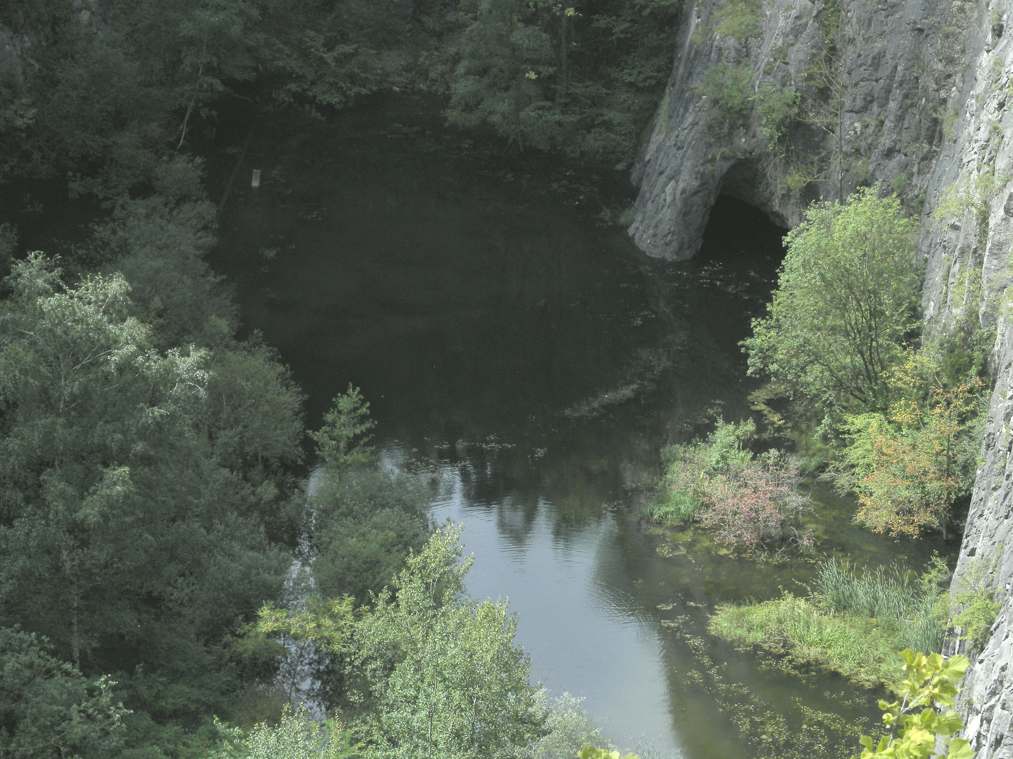 lom Mexiko